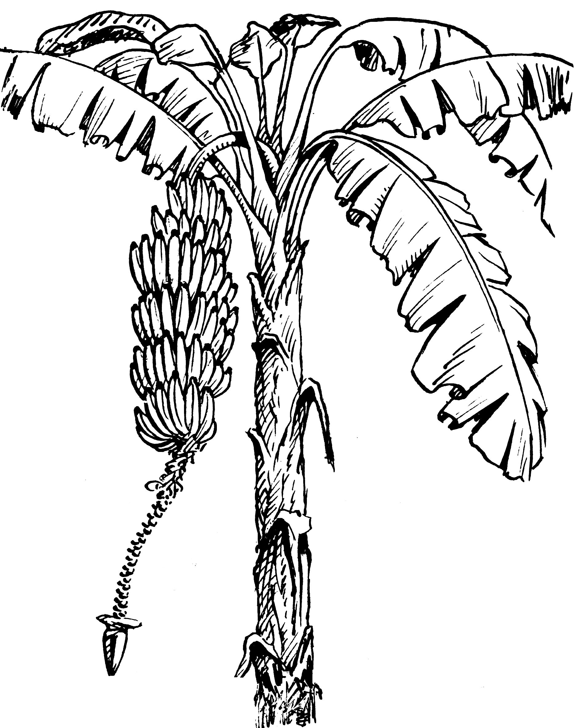 Banana